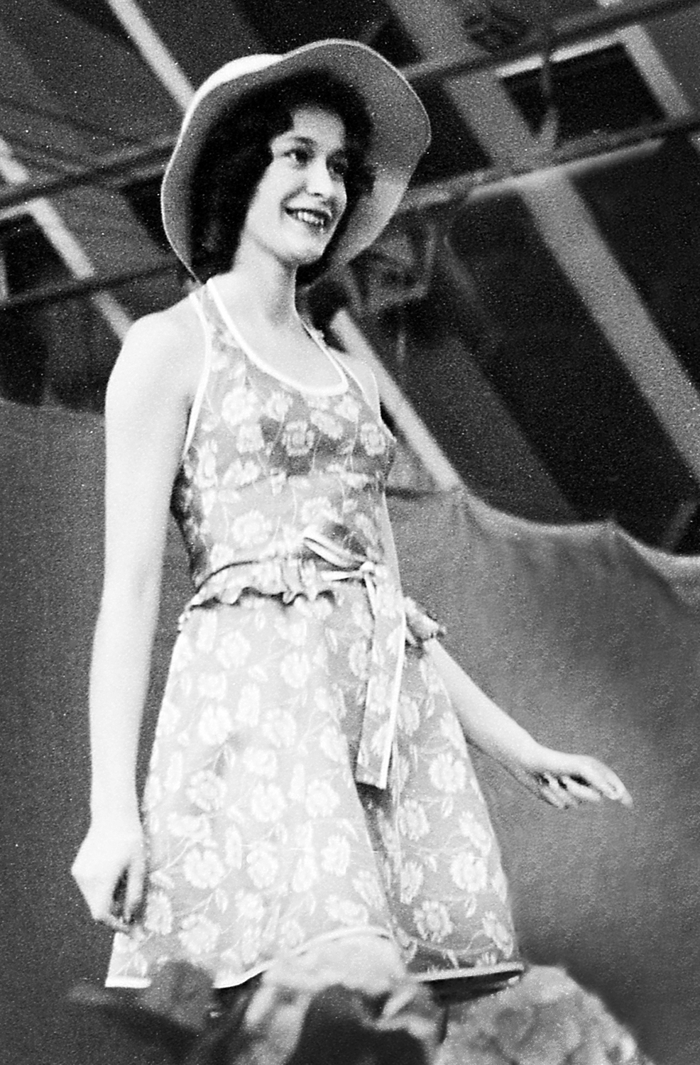 Nady Sprenk-Dorn, eesti näitleja 74